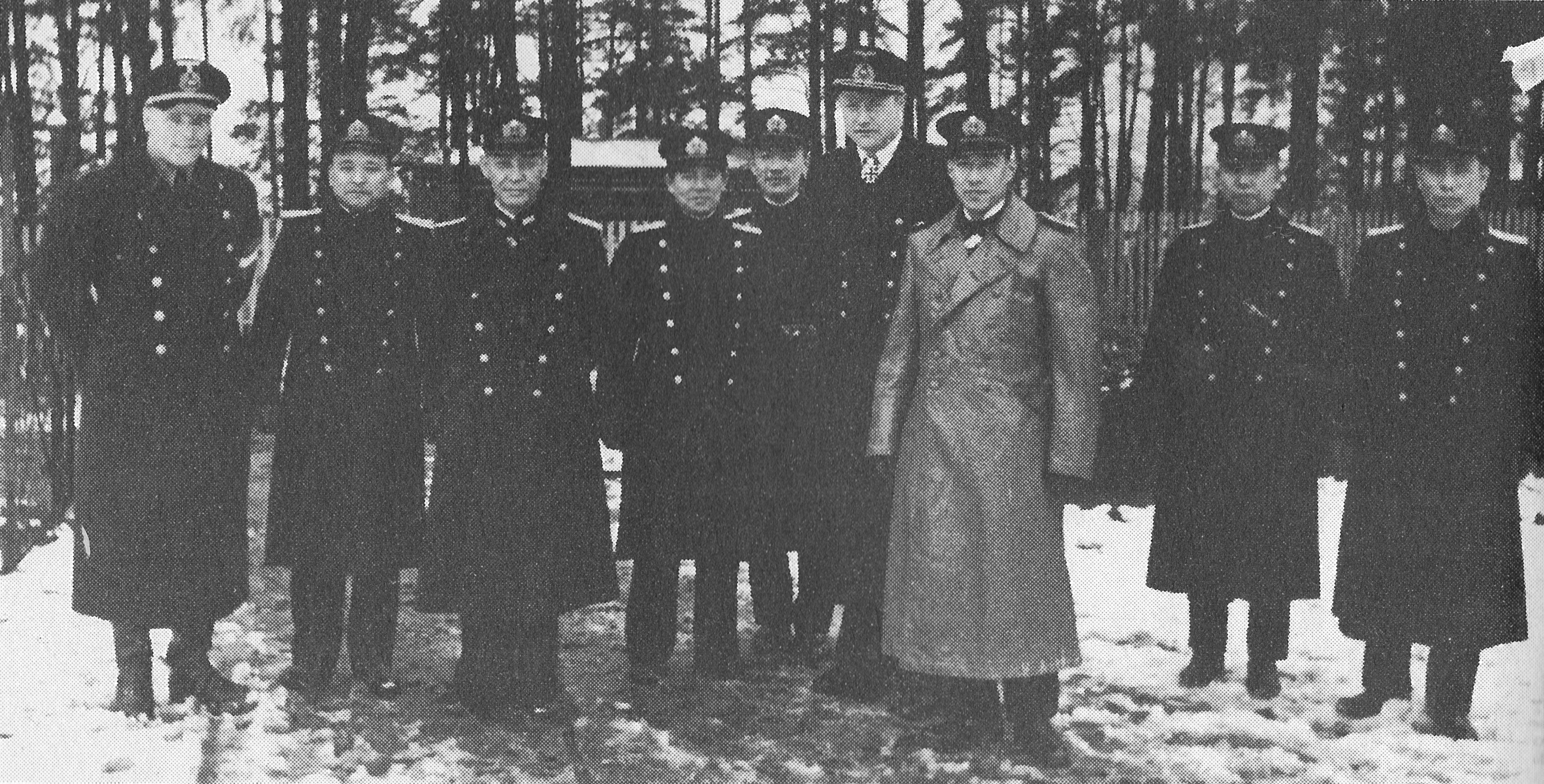 ドイツ・シュレジアにて海軍演習場を視察する遣独使ら。